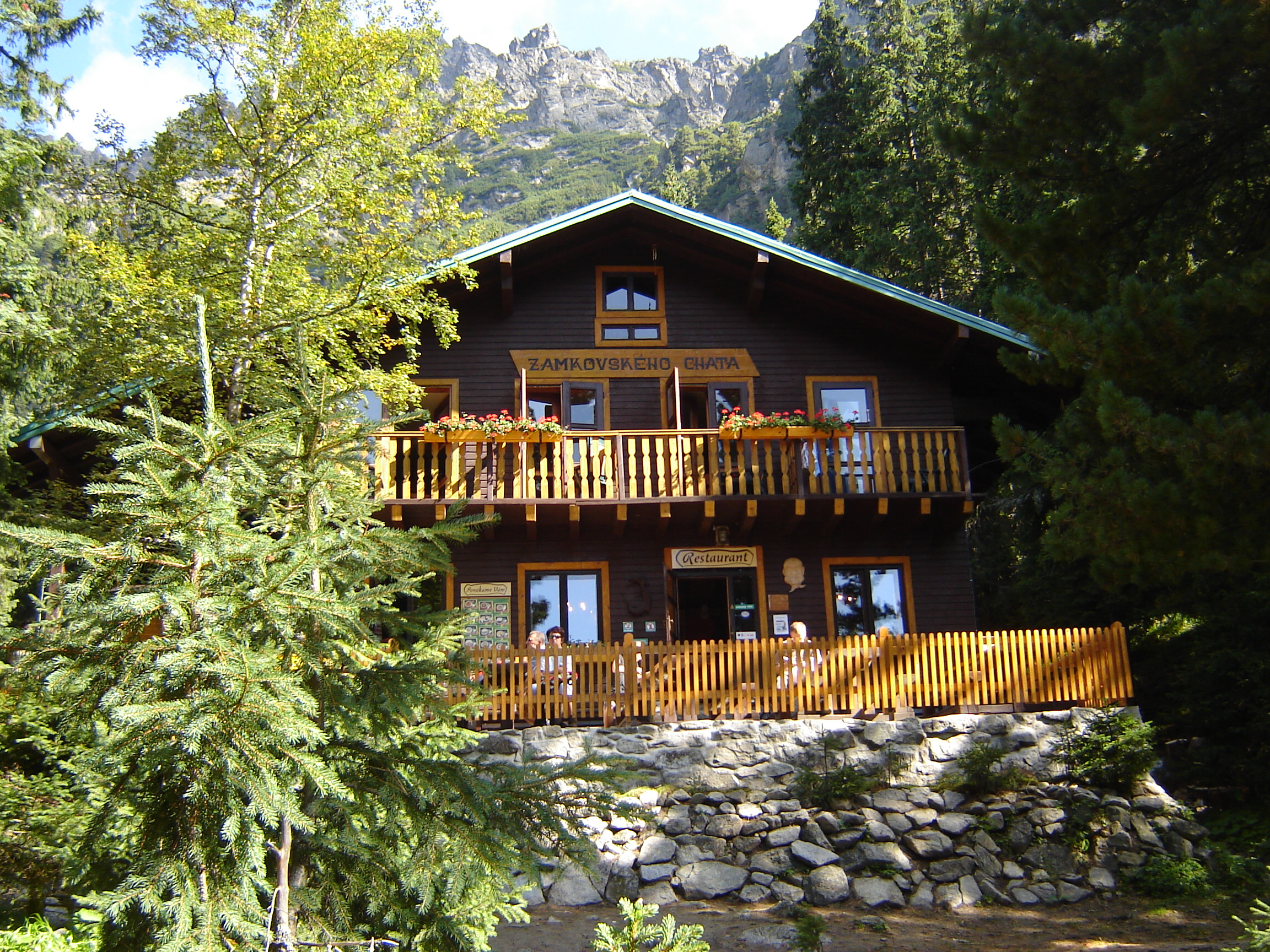 Zamkovského chata